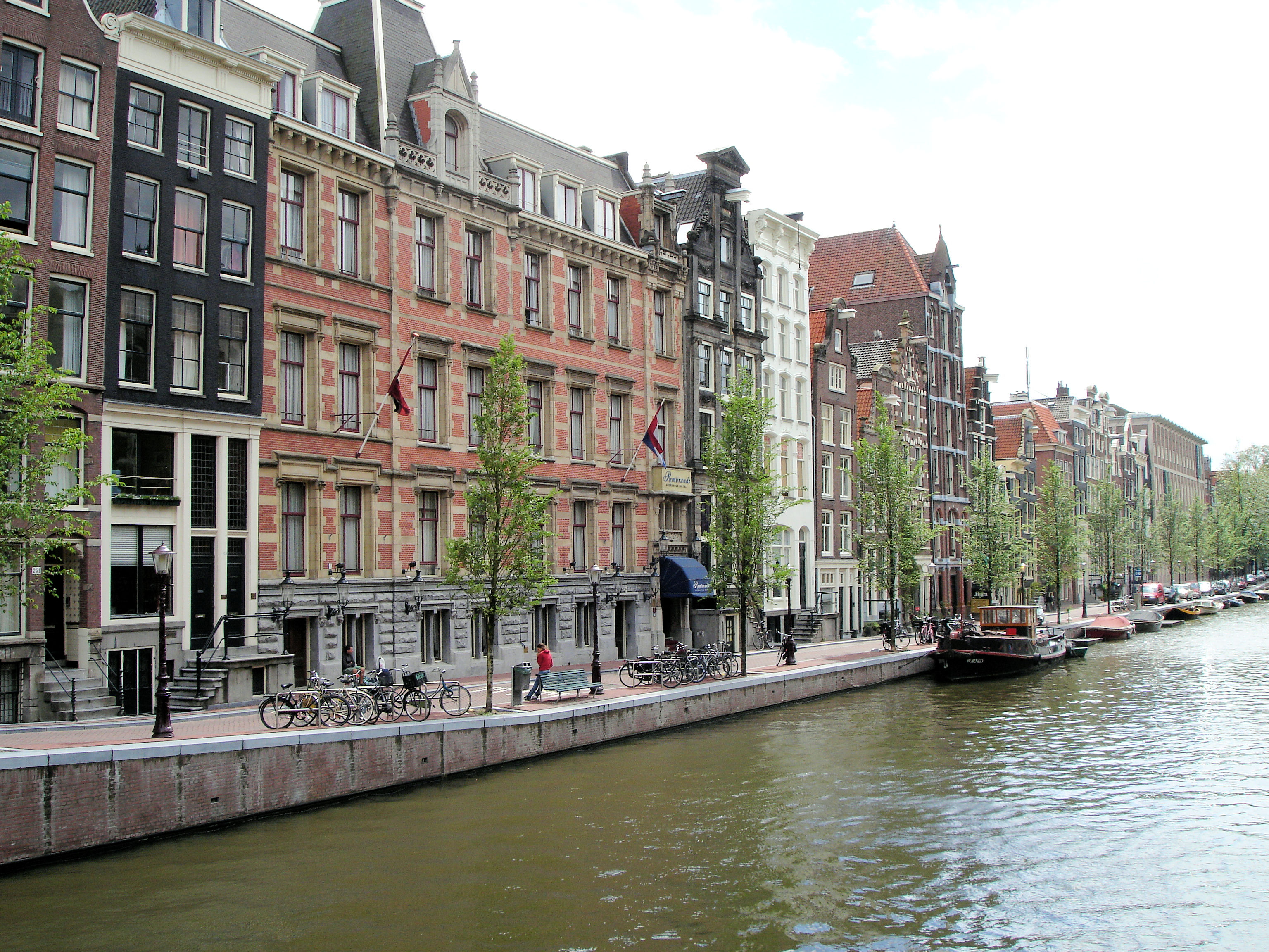 Amsterdam, Netherlands